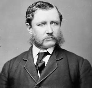 Dr. George Turner Orton, M.P., (Wellington Centre, Ont.)